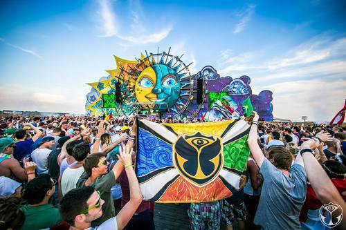 Main stage